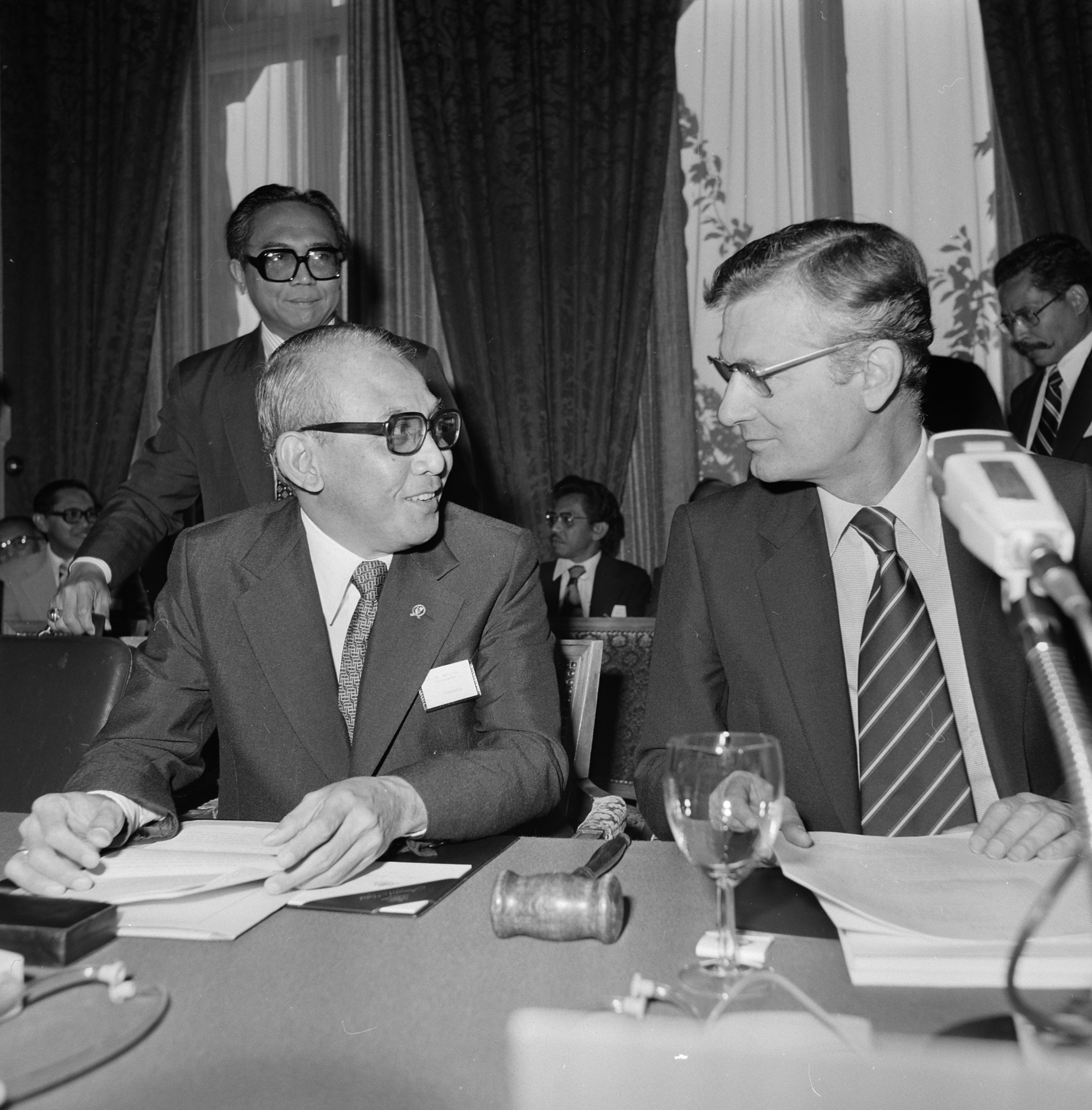 Collectie / Archief : Fotocollectie Anefo Reportage / Serie : [ onbekend ] Beschrijving : IGGI conferentie; minister De Koning en minister Widjo Datum : 22 mei 1978 Persoonsnaam : Koning, Jan de Fotograaf : Croes, Rob C. / Anefo Auteursrechthebbende : Nationaal Archief Materiaalsoort : Negatief (zwart/wit) Nummer archiefinventaris : bekijk toegang 2.24.01.03 Bestanddeelnummer : 929-7330